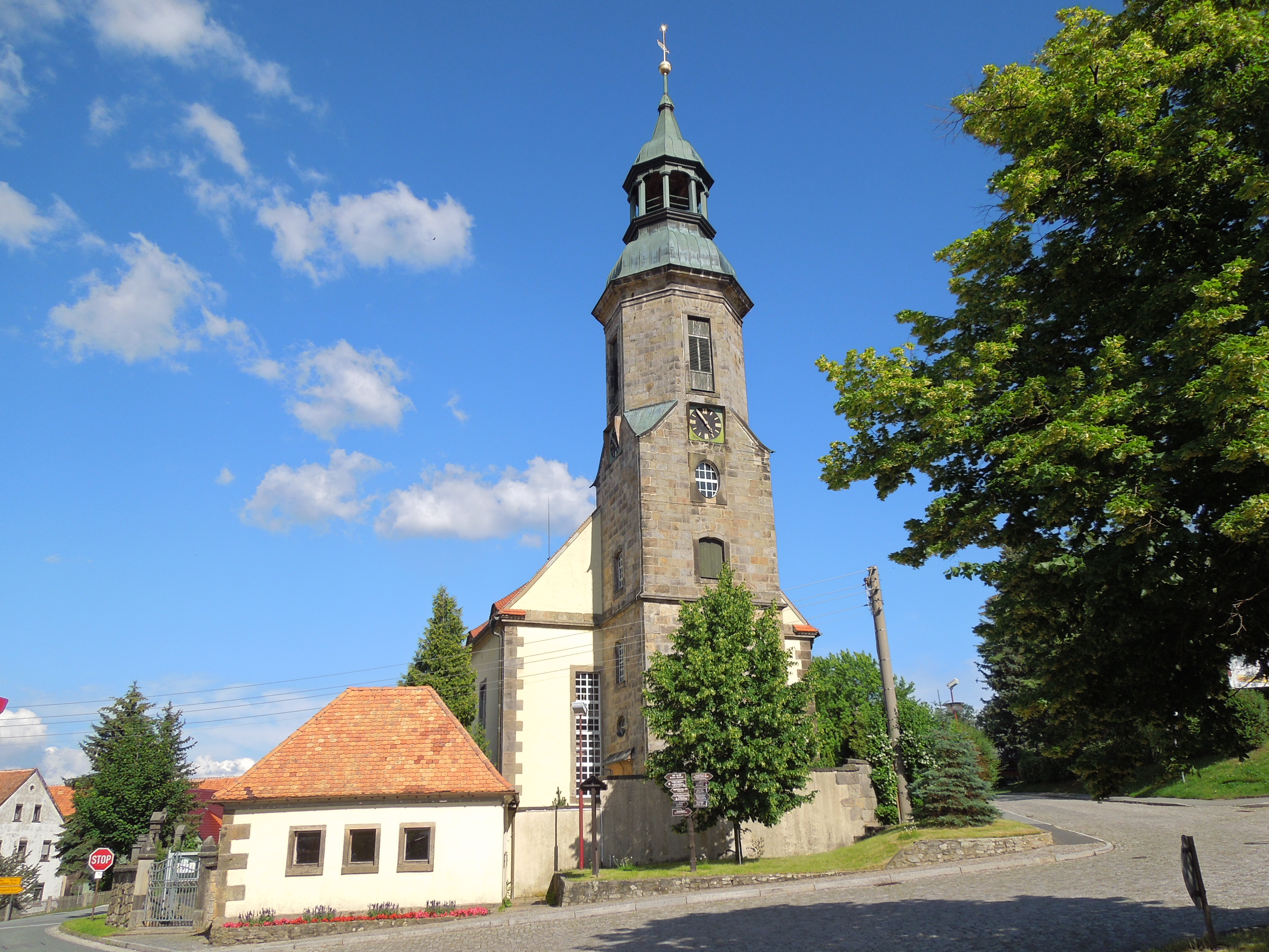 Blick von der Hauptstraße zur Kirche in Waltersdorf